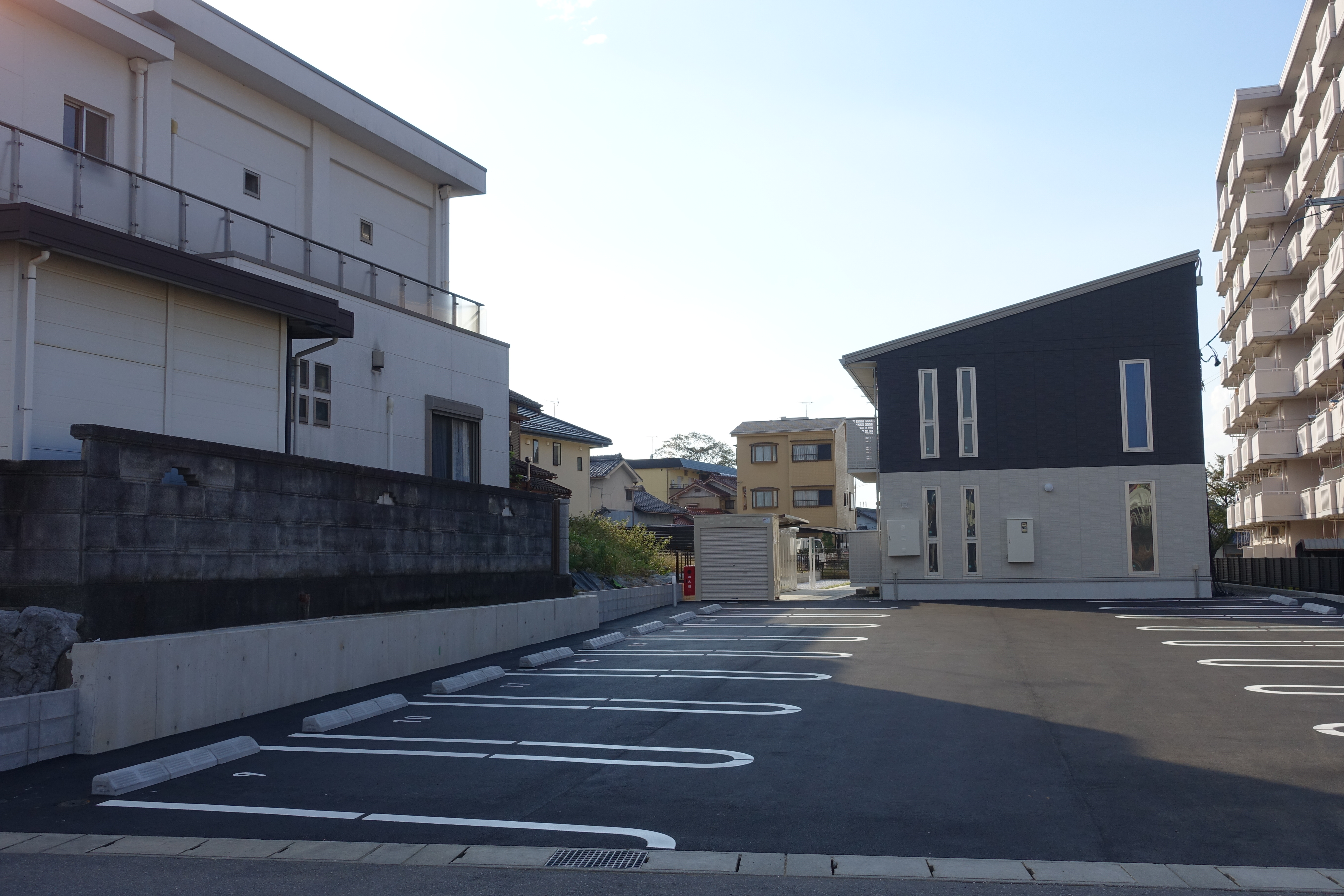 2005年に廃止となった名古屋鉄道近ノ島駅跡地。2018年に整地され駐車場となった。